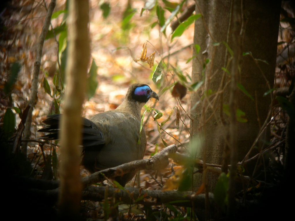 Giant Coua Coua gigas, Madagascar.